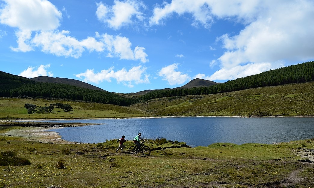 Laguna Nariguiña